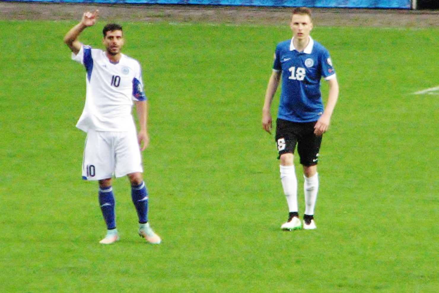 Danilo Ezequiel Rinaldi ja Karol Mets Eesti - San Marino mängus